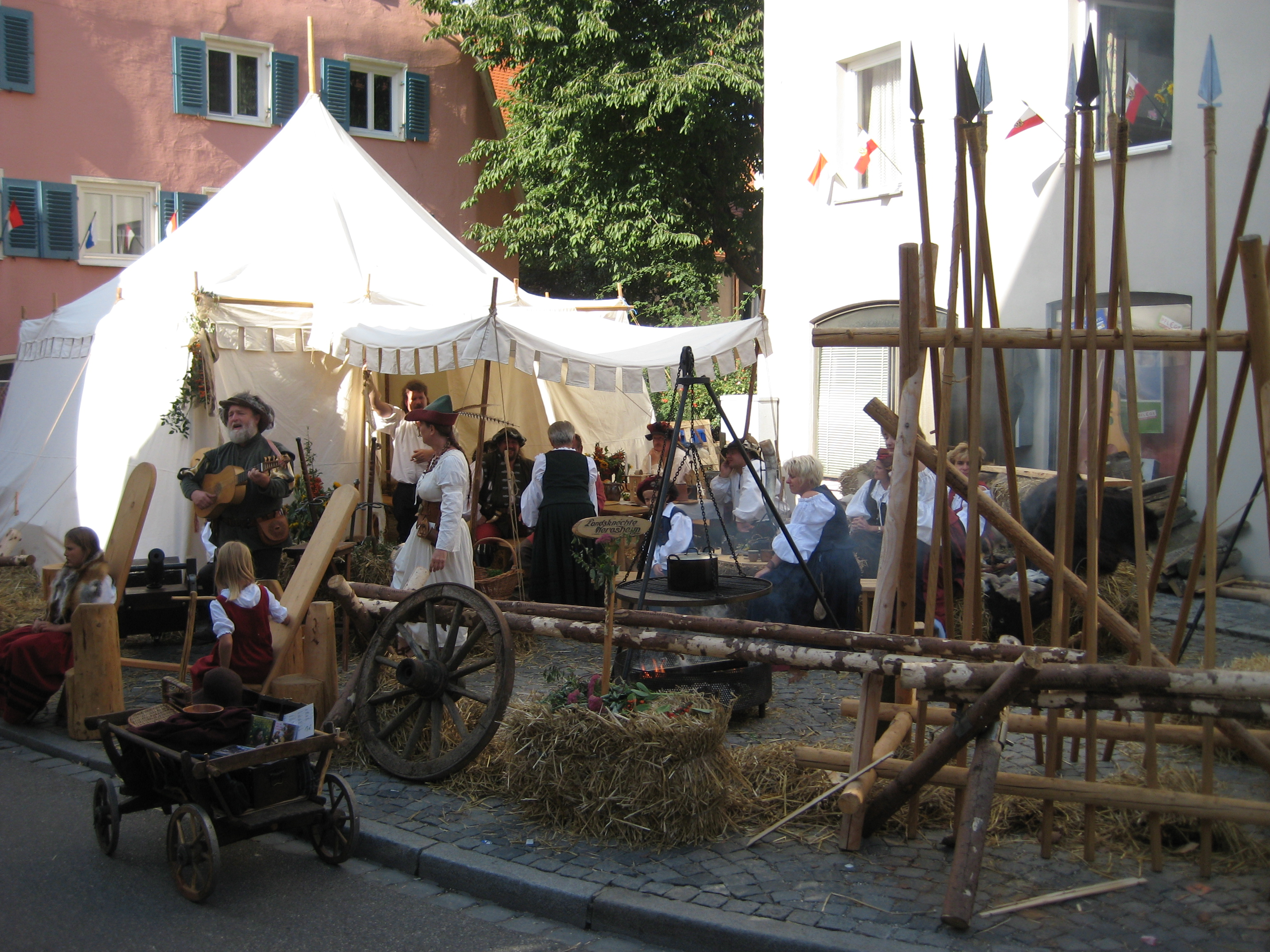 Nördlinger Stadtmauerfest 2007: Lagerimpressionen